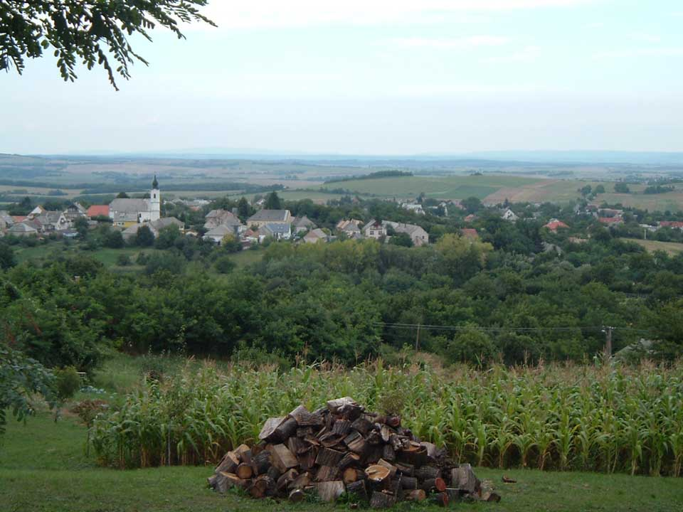 Bakonynána, Hungary